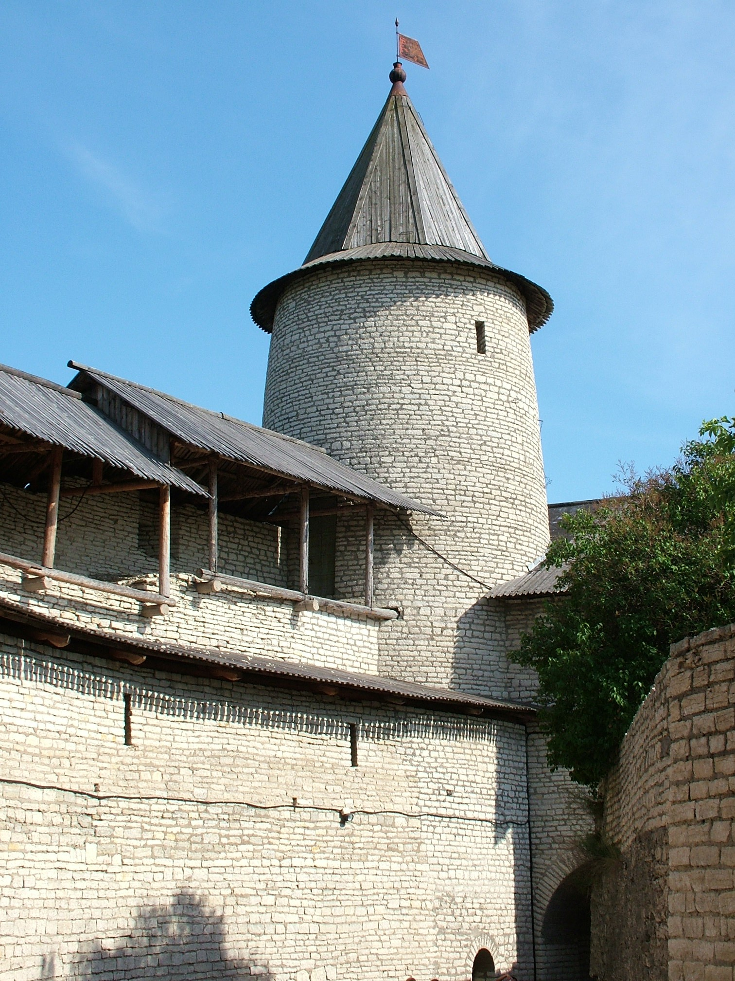 Kremlin in Pskov, Russia.